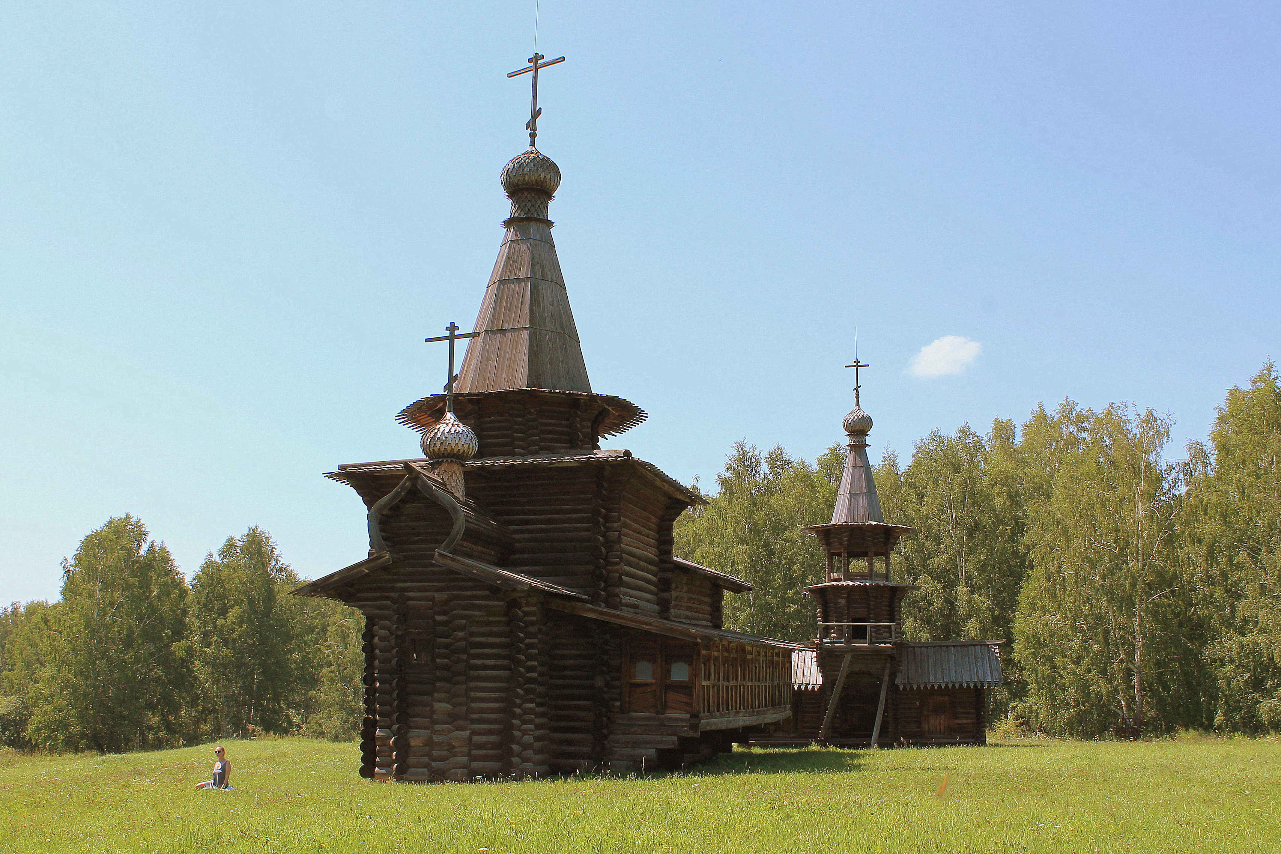 Историко-архитектурный музей под открытым небом. Спасо-зашиверская церковь, 1700